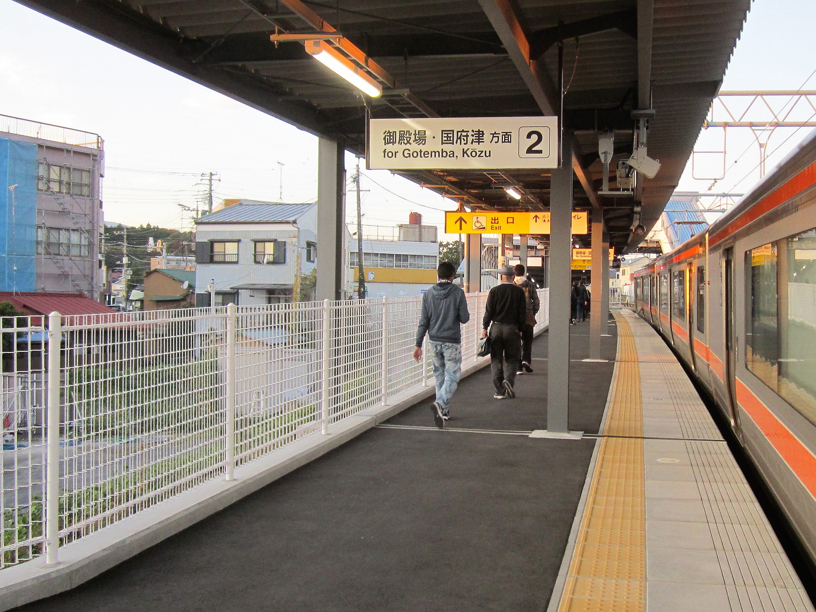 2019年に新設された岩波駅2番線ホーム